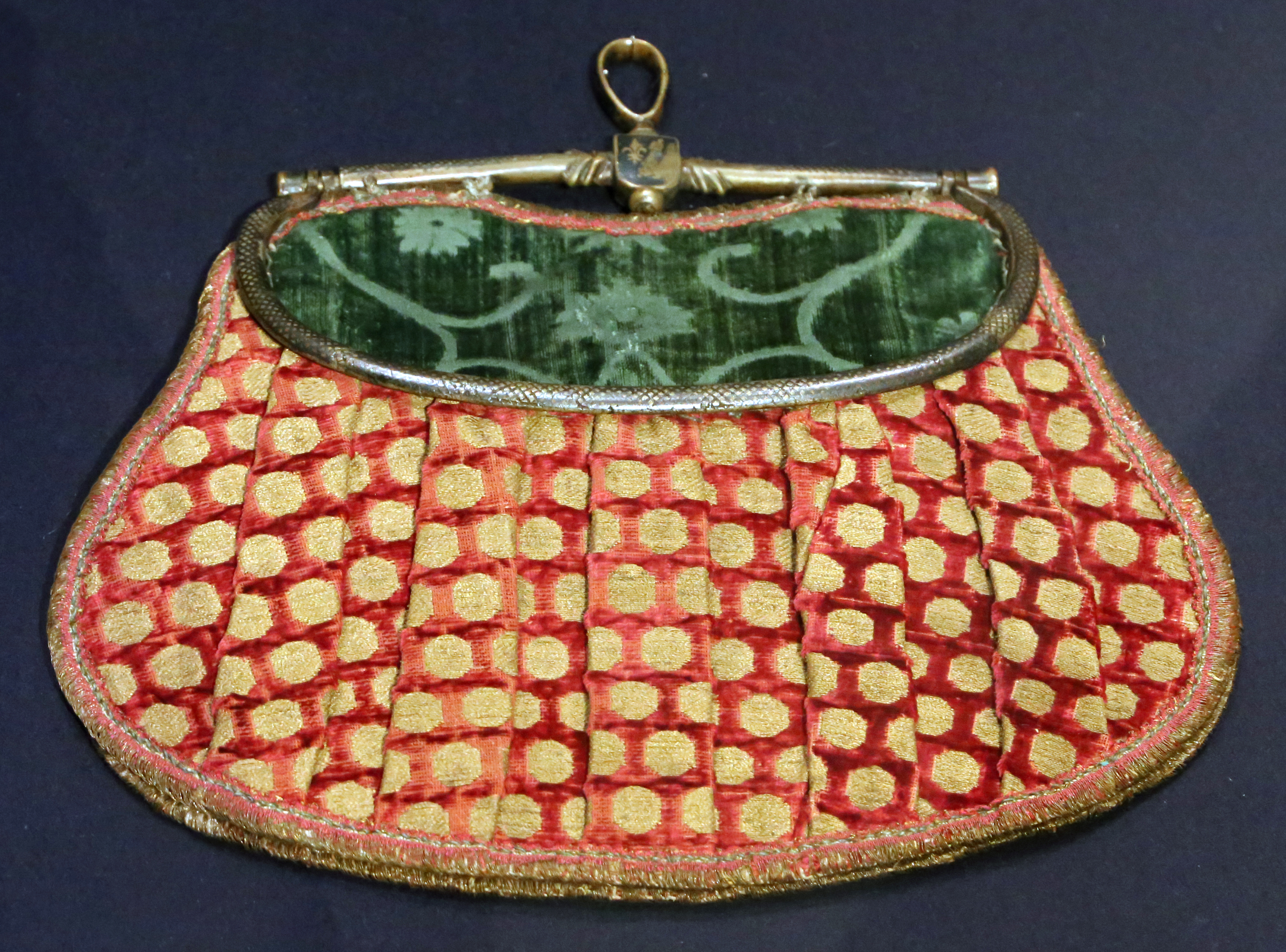 Museo del tessuto This is a photo of a monument which is part of cultural heritage of Italy.